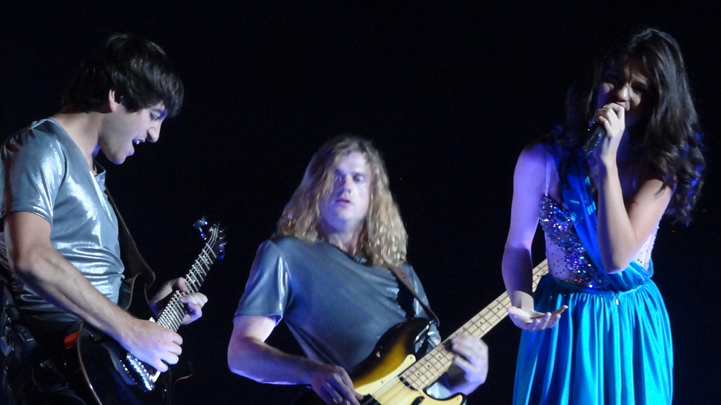 Selena Gomez & the Scene auf ihrer We-Own-the-Night-Tour im Februar 2012 (Ethan Roberts (links), Joey Clement (mitte) und Selena Gomez (rechts))